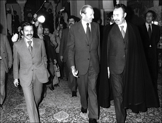 Alger 1975, l'ancien président de la République algérienne Houari Boumédiène (à droite) et son jeune ministre des affaires étrangères Abdelaziz Bouteflika (à gauche), en compagnie du secrétaire général des Nations unies Kurt Waldheim (au centre).